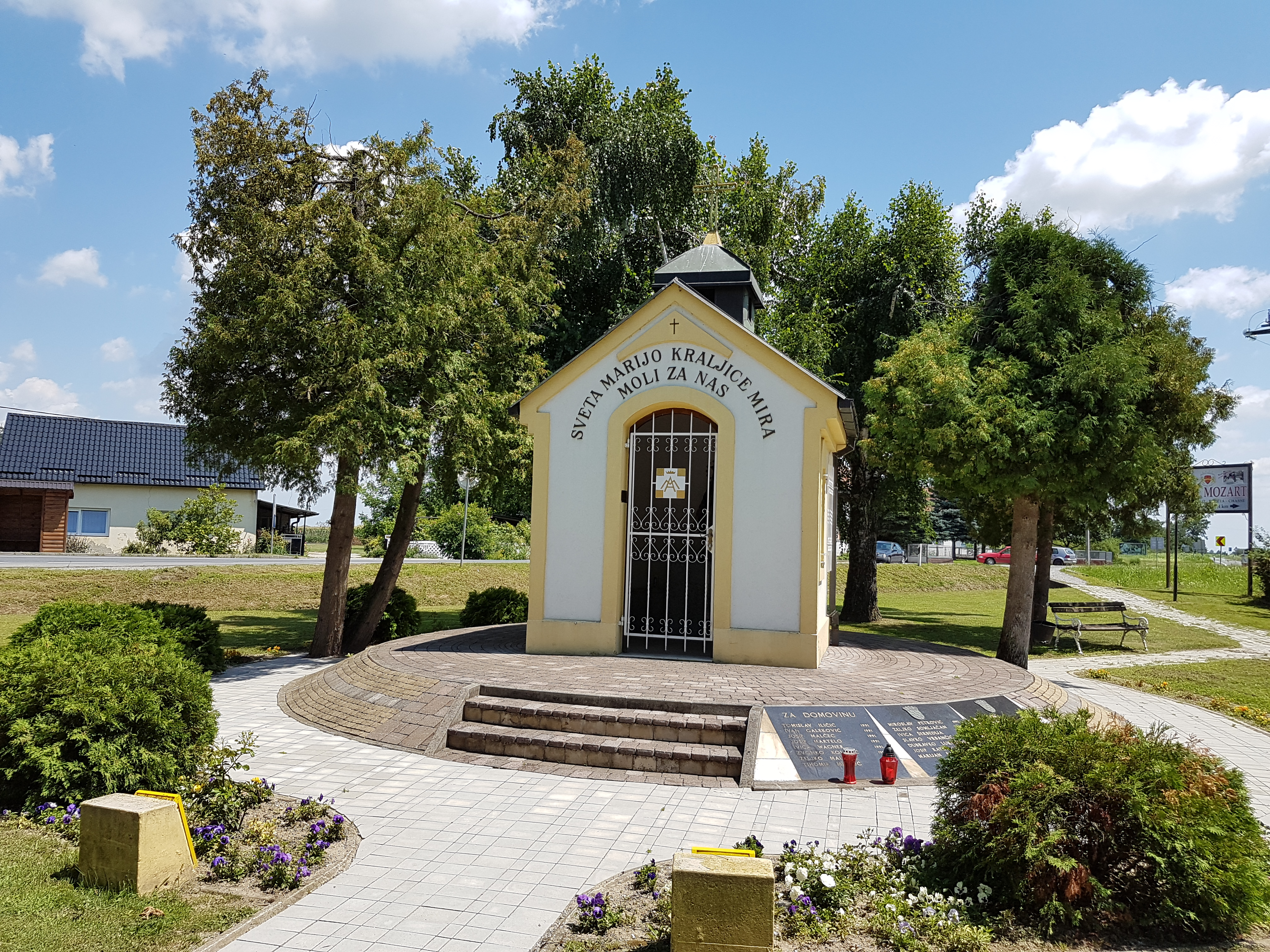 Spomen kapelica Marije Kraljice mira u Špišić Bukovici, podignuta 1995. godine u čast poginulim hrvatskim braniteljima Domovinskog rata